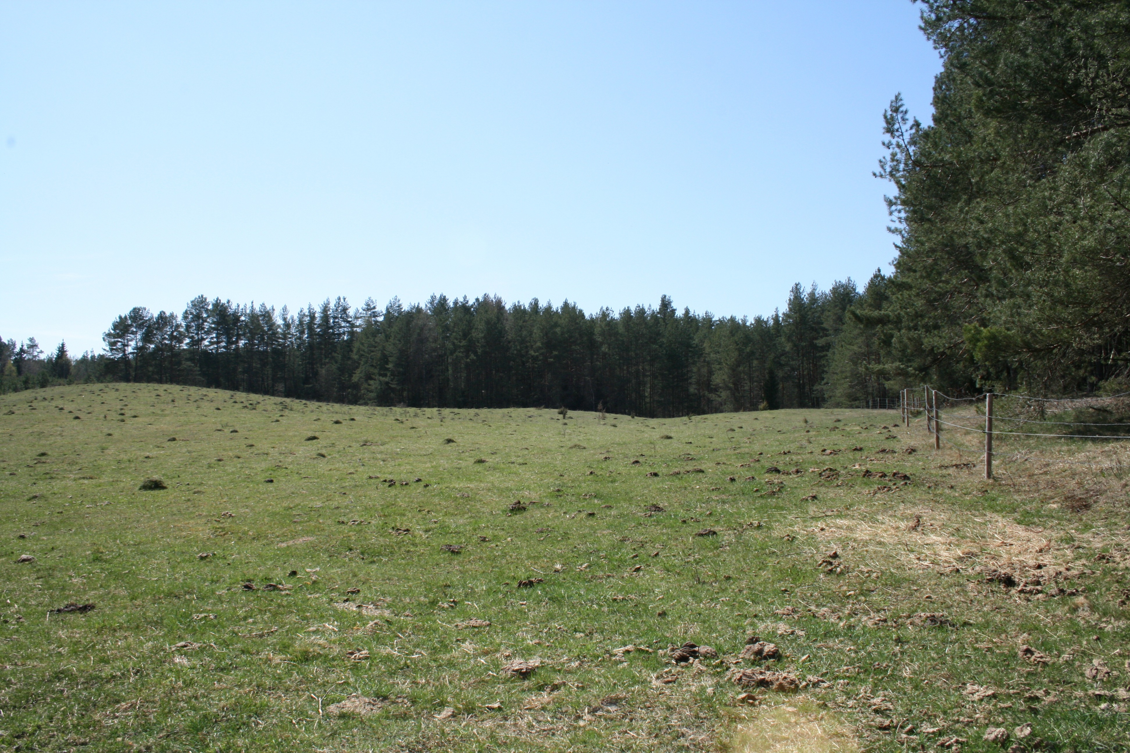 Kučiuliškės draustinis, Lithuania